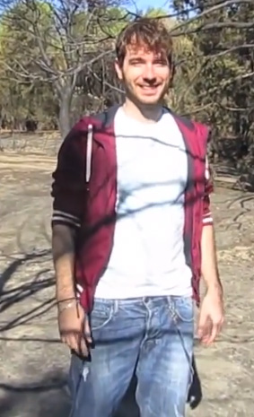 Productor musical i cantant, ha ajudat a alguns youtubers amb les seves cançons.